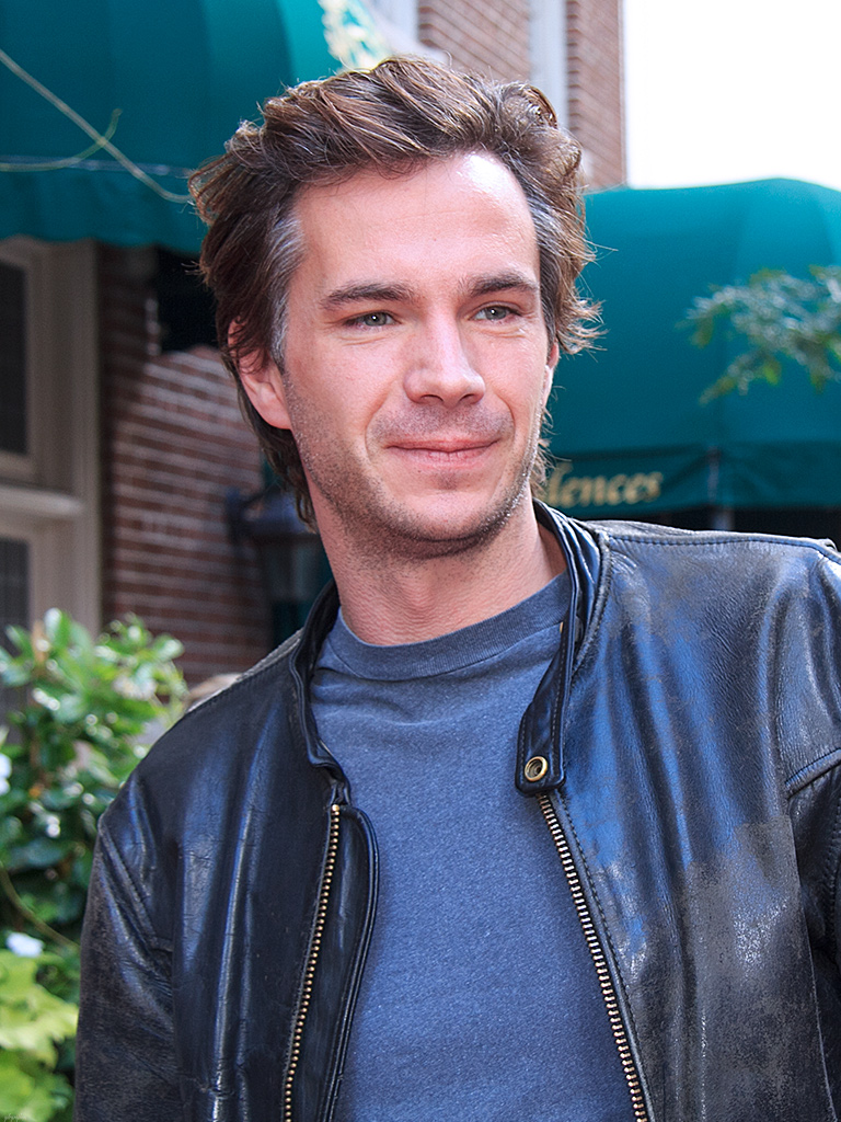 Toronto International Film Festival 2012.